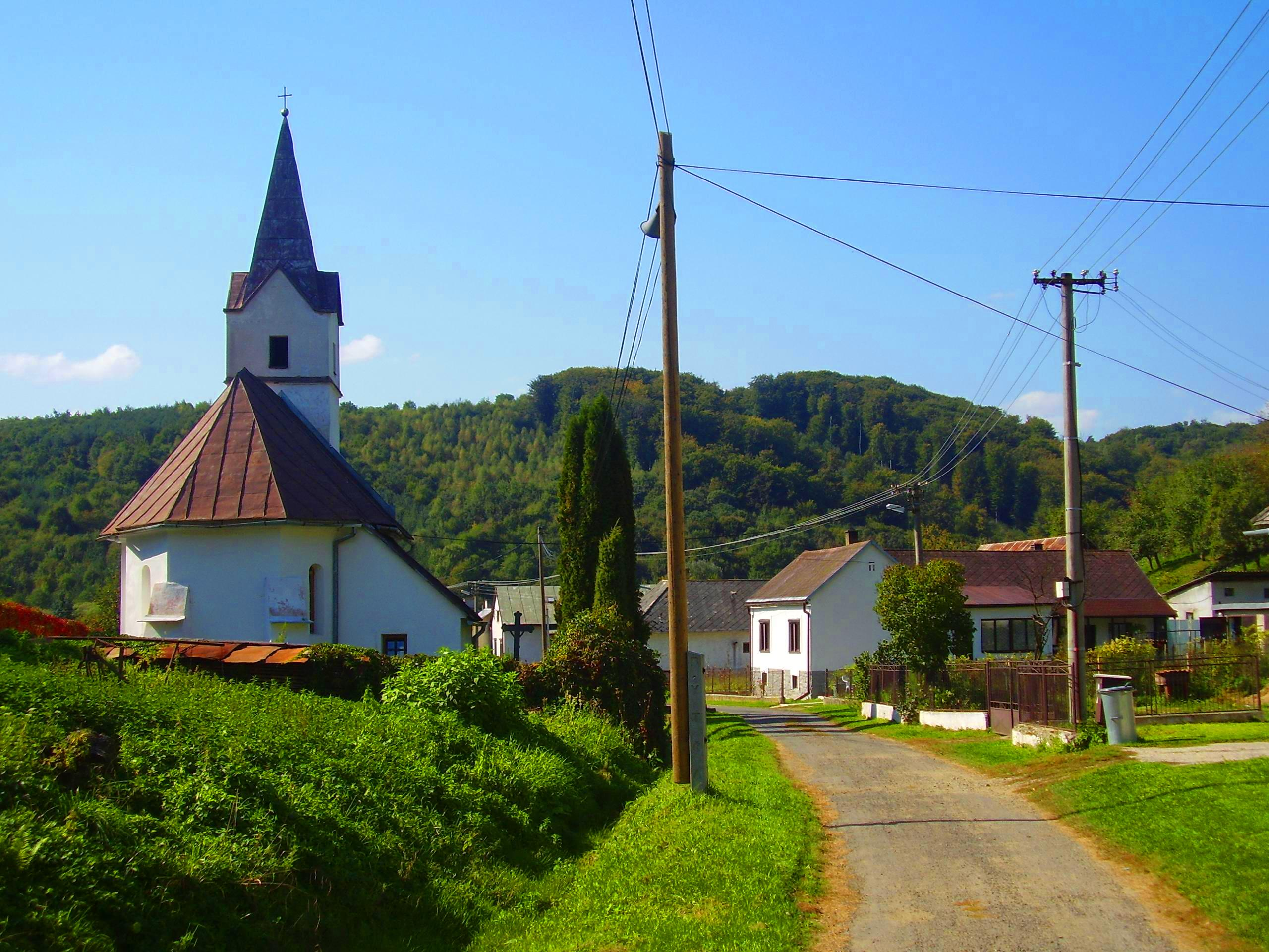 rímskokatolícky kostol Najsvätejšieho srdca Ježišovho z roku 1913 v osade Poloma (obec Jasenovce)